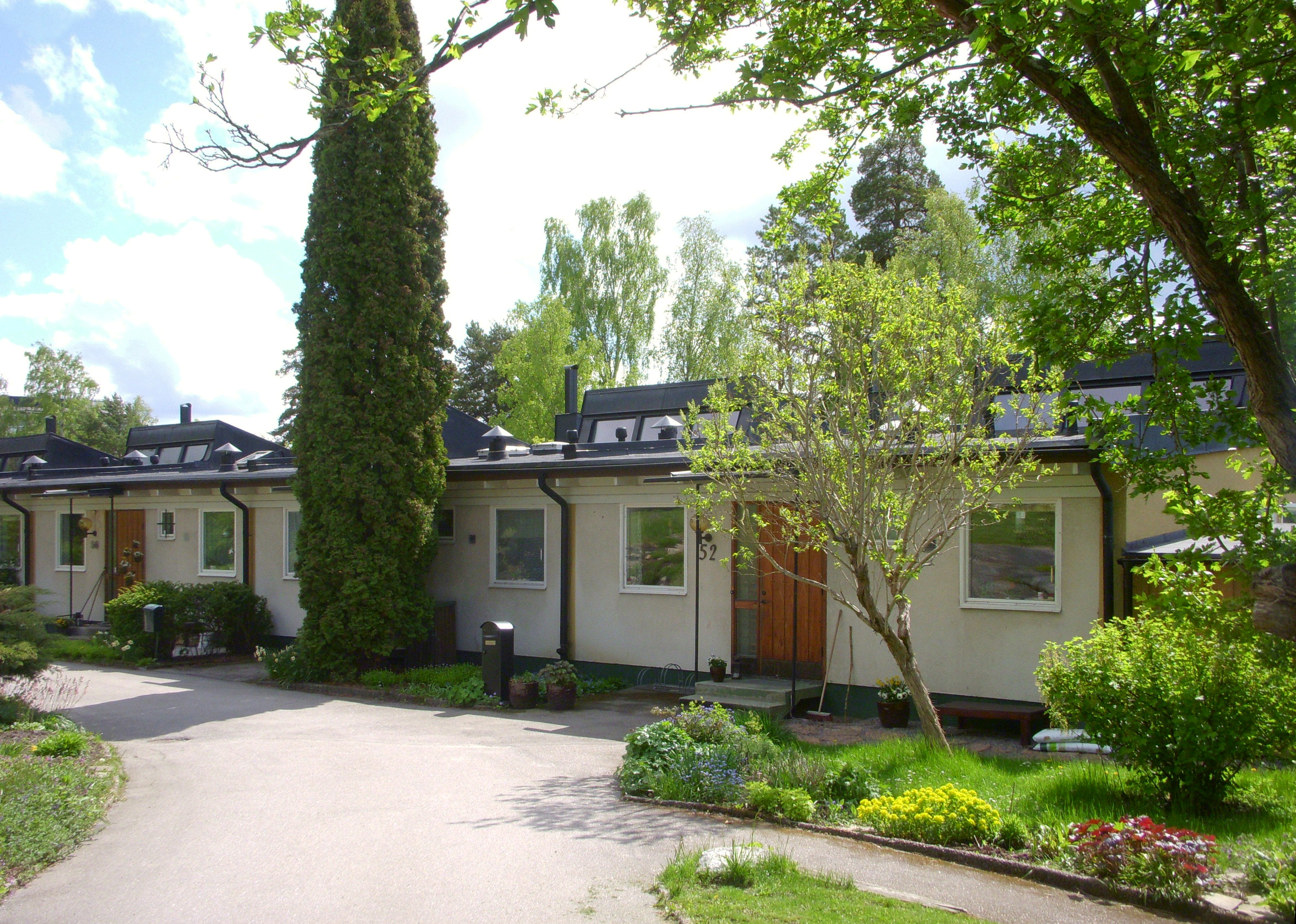 Radhusområde Fresia 5, Måbärsstigen, i Hässelby strand (kallad "Radiohusen") arkitekter Bertil Karlén och Josef Stäck